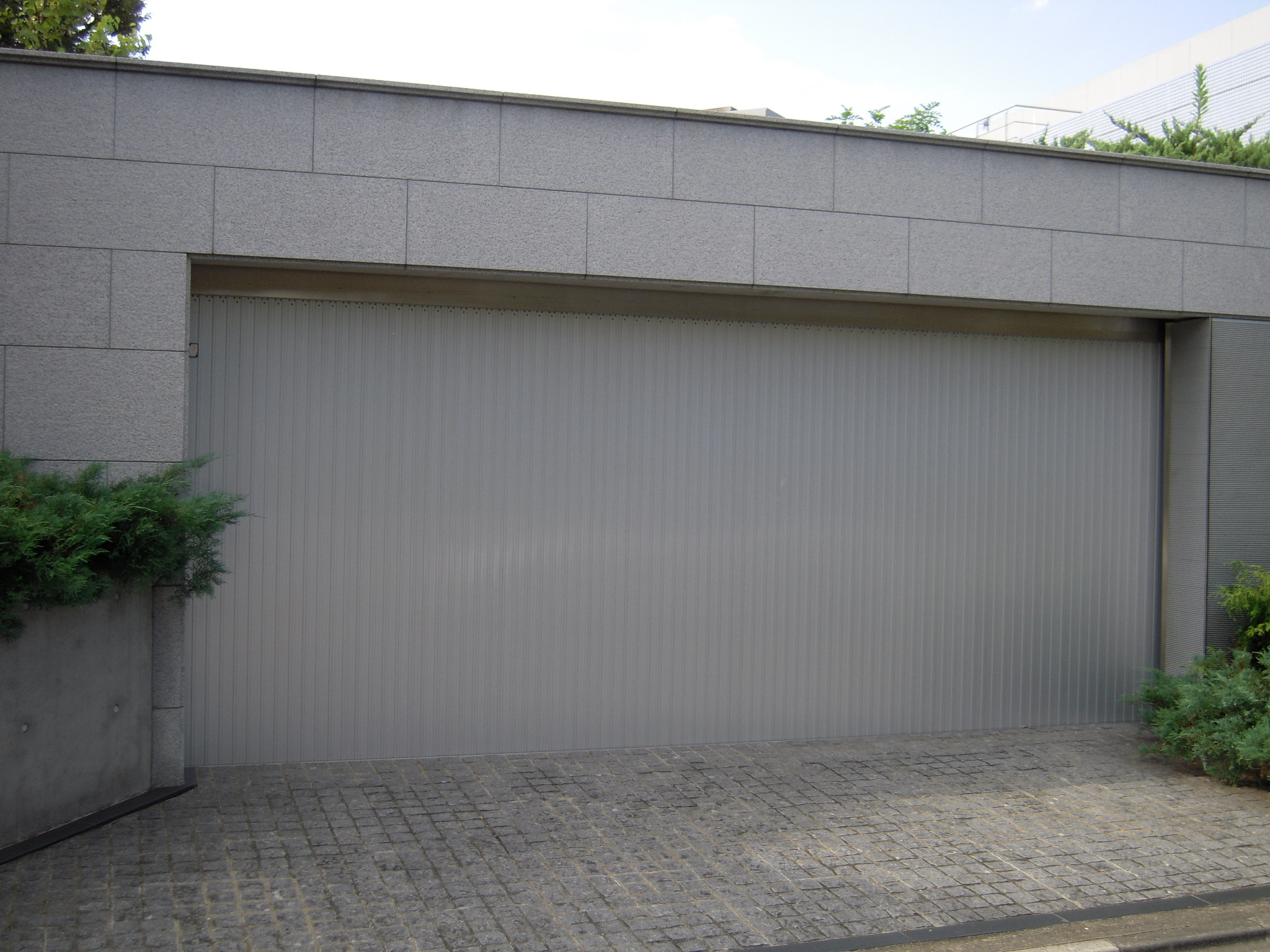 株式会社横引シャッター製品